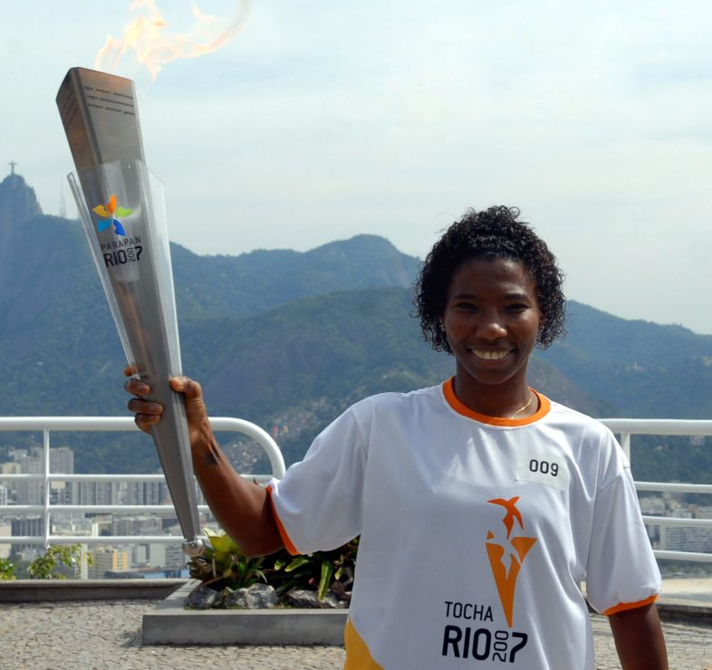 A jogadora de futebol brasileira Delma Gonçalves (Pretinha)